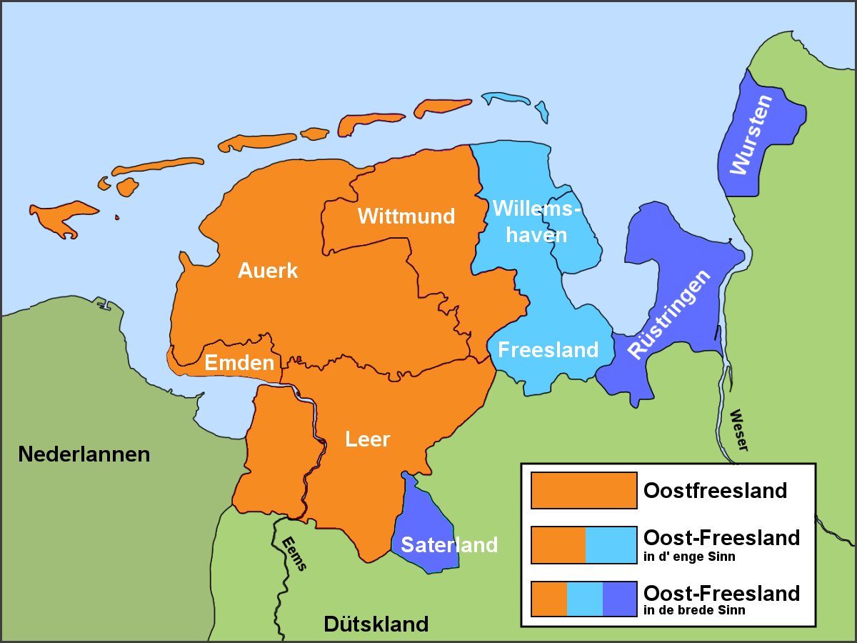 Kaart um to wiesen, waar de Unnerscheed tüsken Oostfreesland un Oost-Freesland is.